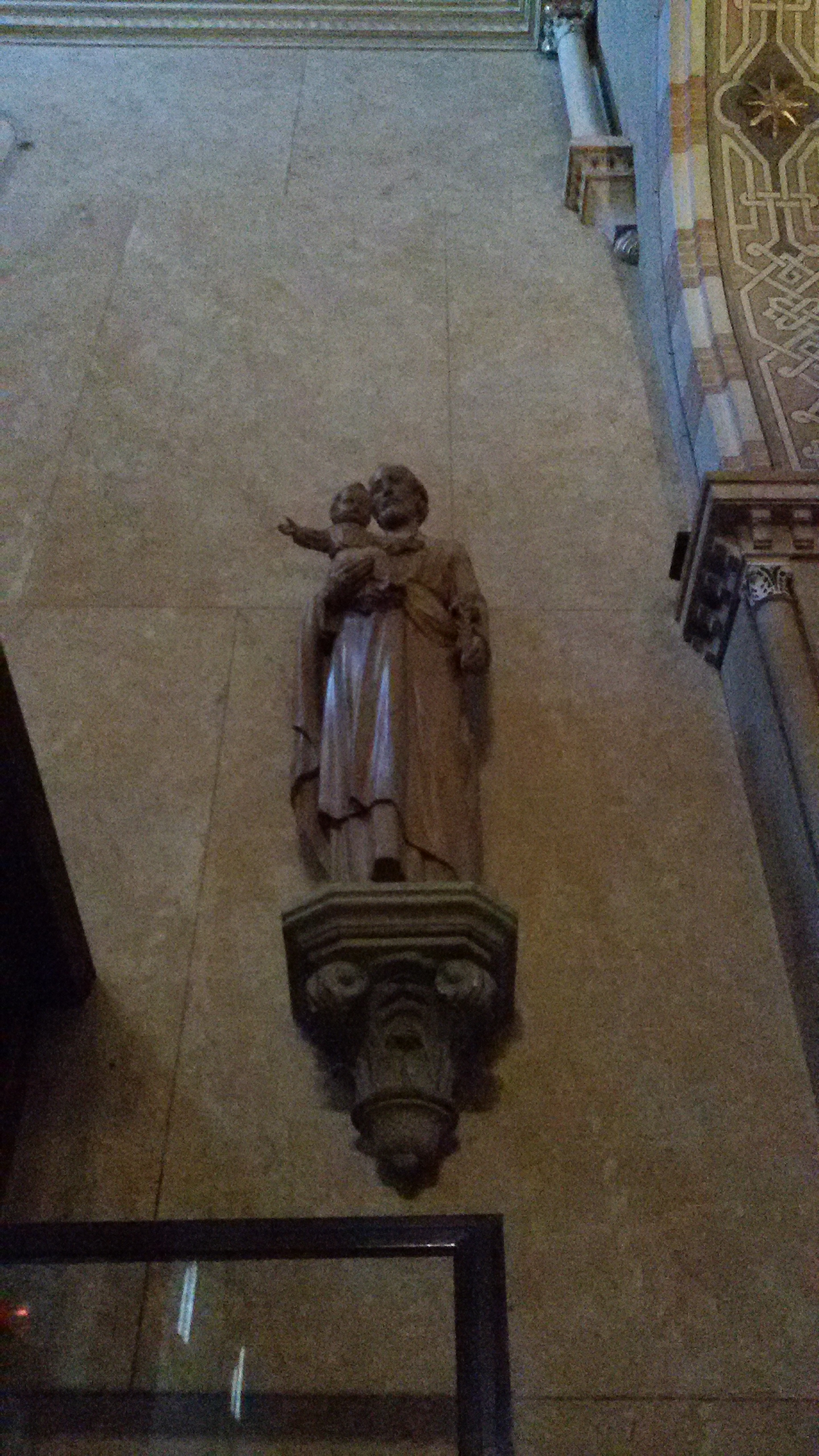 Chiesa di Santa Cristina Quinto di Treviso